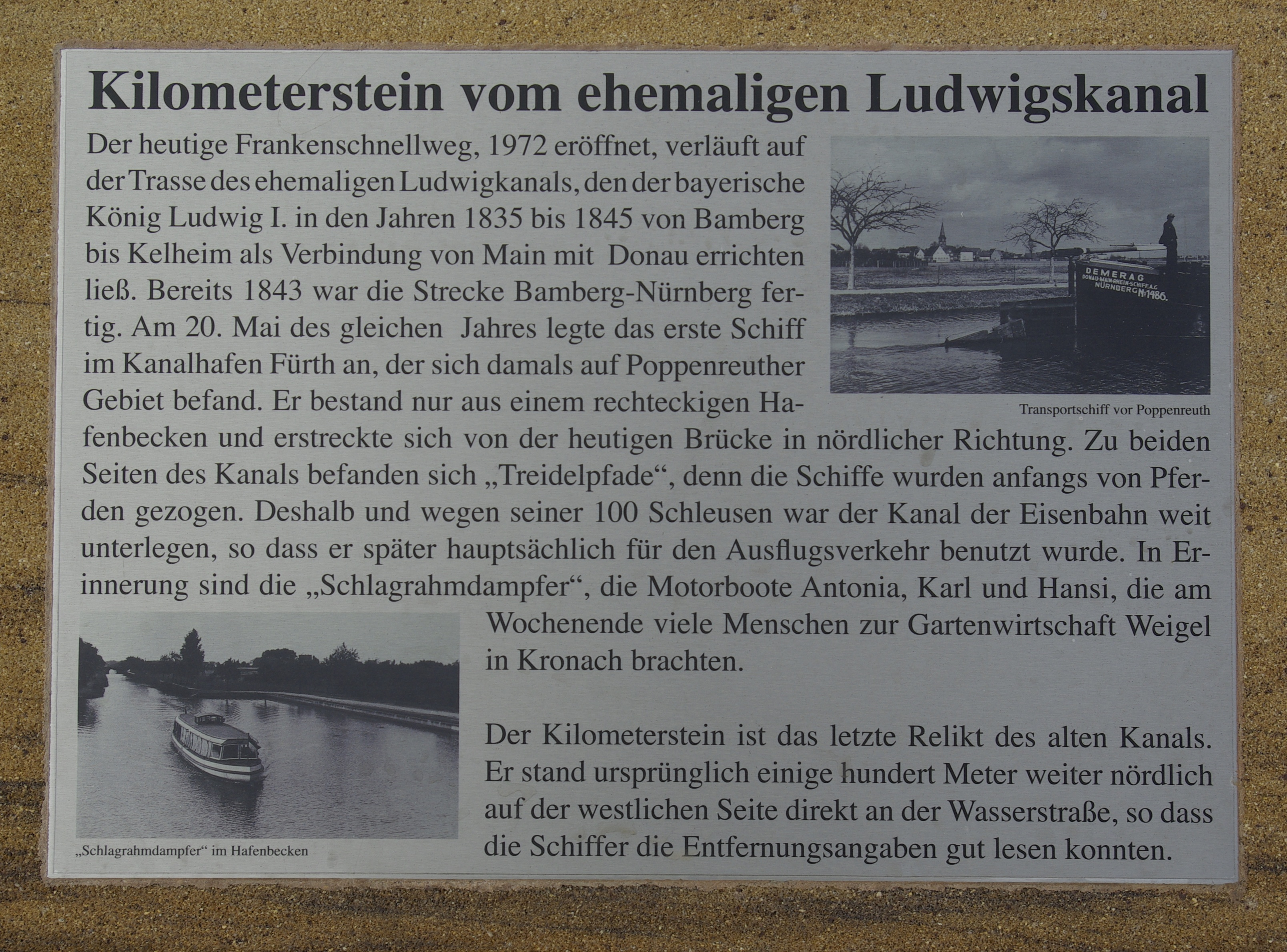 Kilometerstein Nr. 12 des Ludwig-Donau-Main-Kanals an der Poppenreuther Straße in Fürth. Der Stein ist in Fürth eines der wenigen Relikte des hier von der A 73 überbauten Kanals. Er stand ursprünglich einige hundert Meter weiter nördlich. Später wurde er auf eine Verkehrsinsel an die Poppenreuther Straße versetzt, wo er 2012 bei einem Verkehrsunfall beschädigt wurde. 2013 wurde er renoviert und neben einer Gedenktafel wieder errichtet. Alle 10 Kilometer steht bzw. stand ein großer Stein mit Beschriftung, alle Kilometer ein kleinerer Stein.